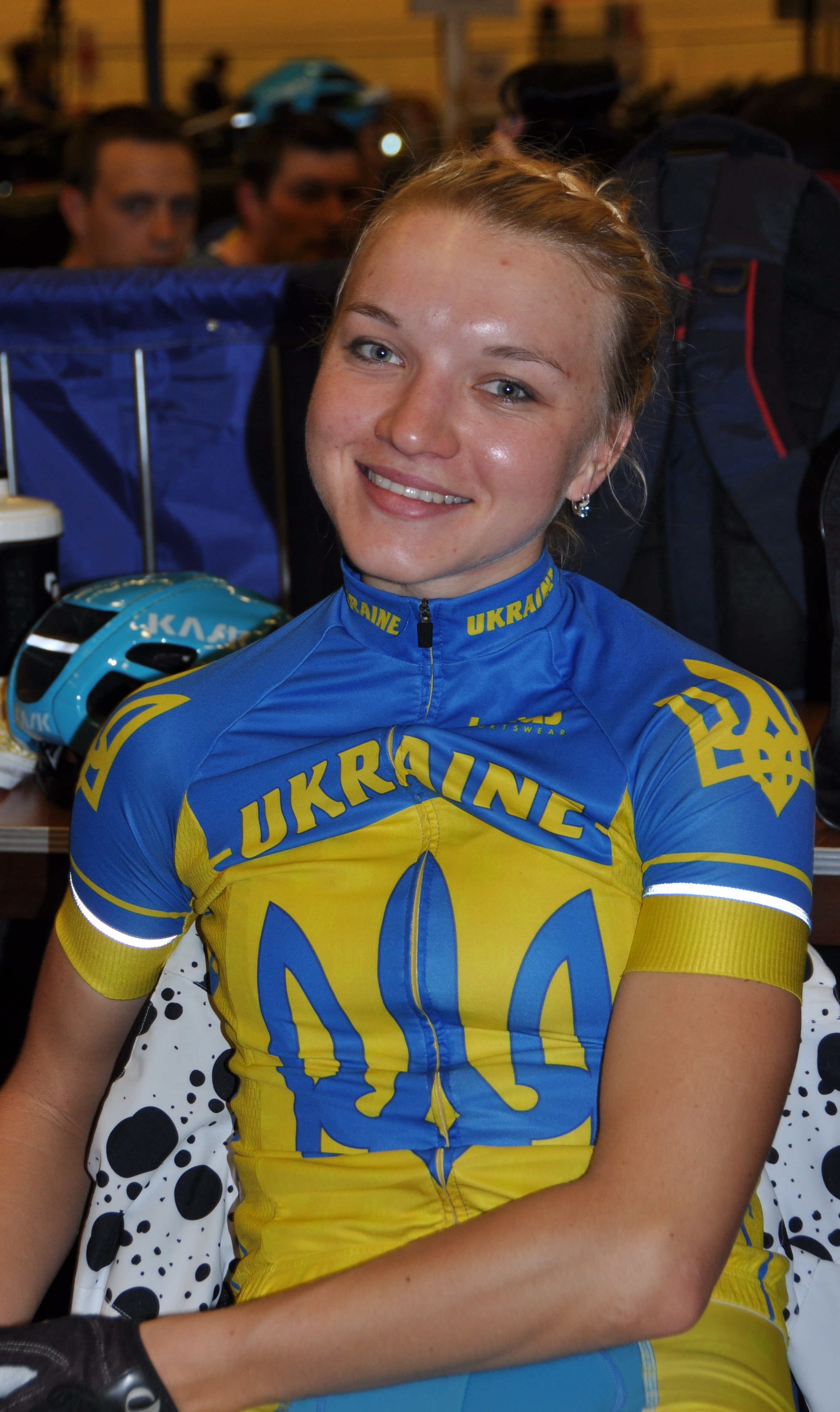 Oksana Kliachina, ukrainische Radsportlerin